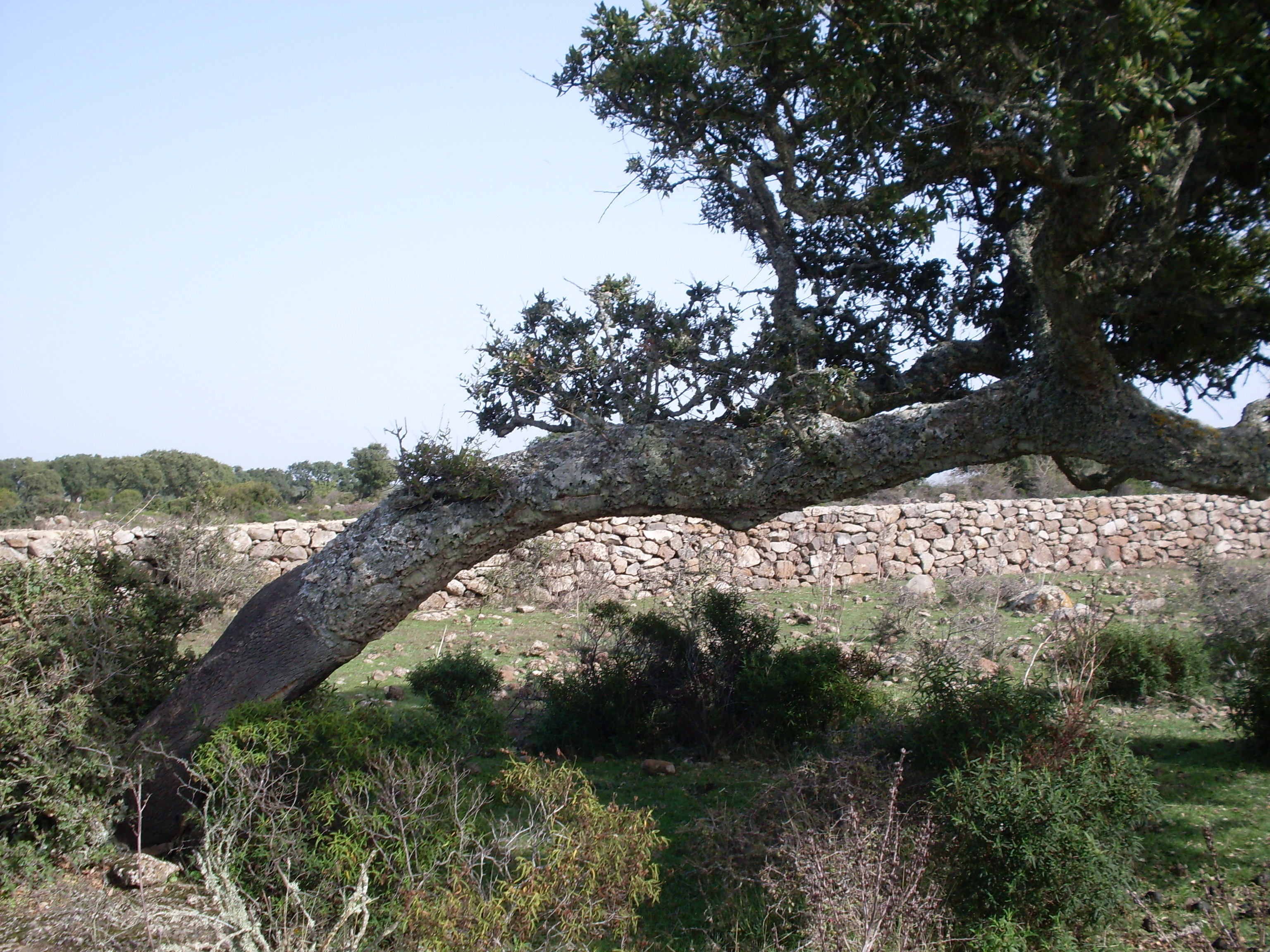 Quercia da sughero con la sua particolare inclinazione